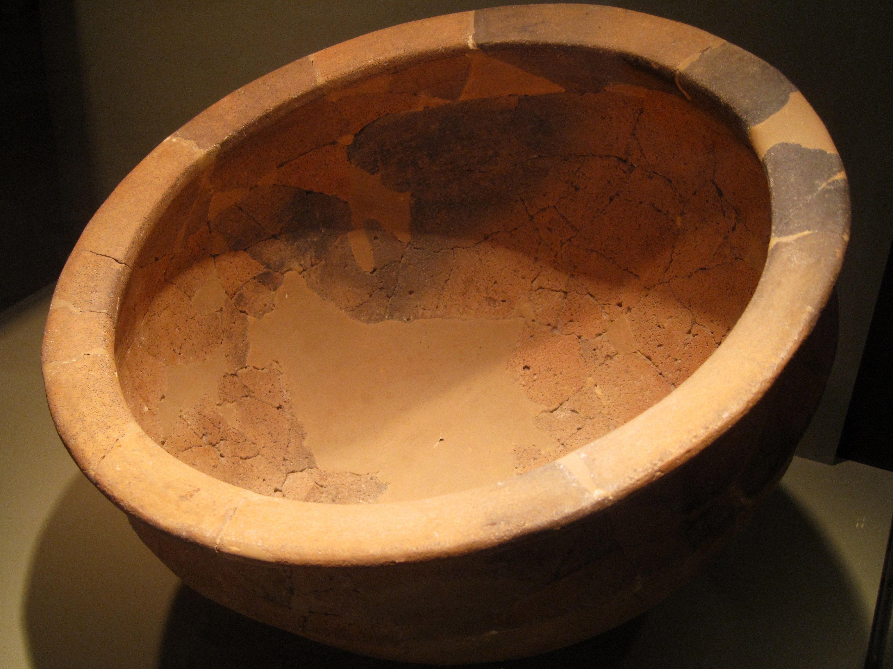 Keramik aus der Zeit von 1700 bis 1100 v. Chr. im Prähistorischen Saal des Historischen Museums von Manacor (Museu d’Història de Manacor), Fundort S’Hospitalet Vell, Gemeinde Manacor, Mallorca, Spanien